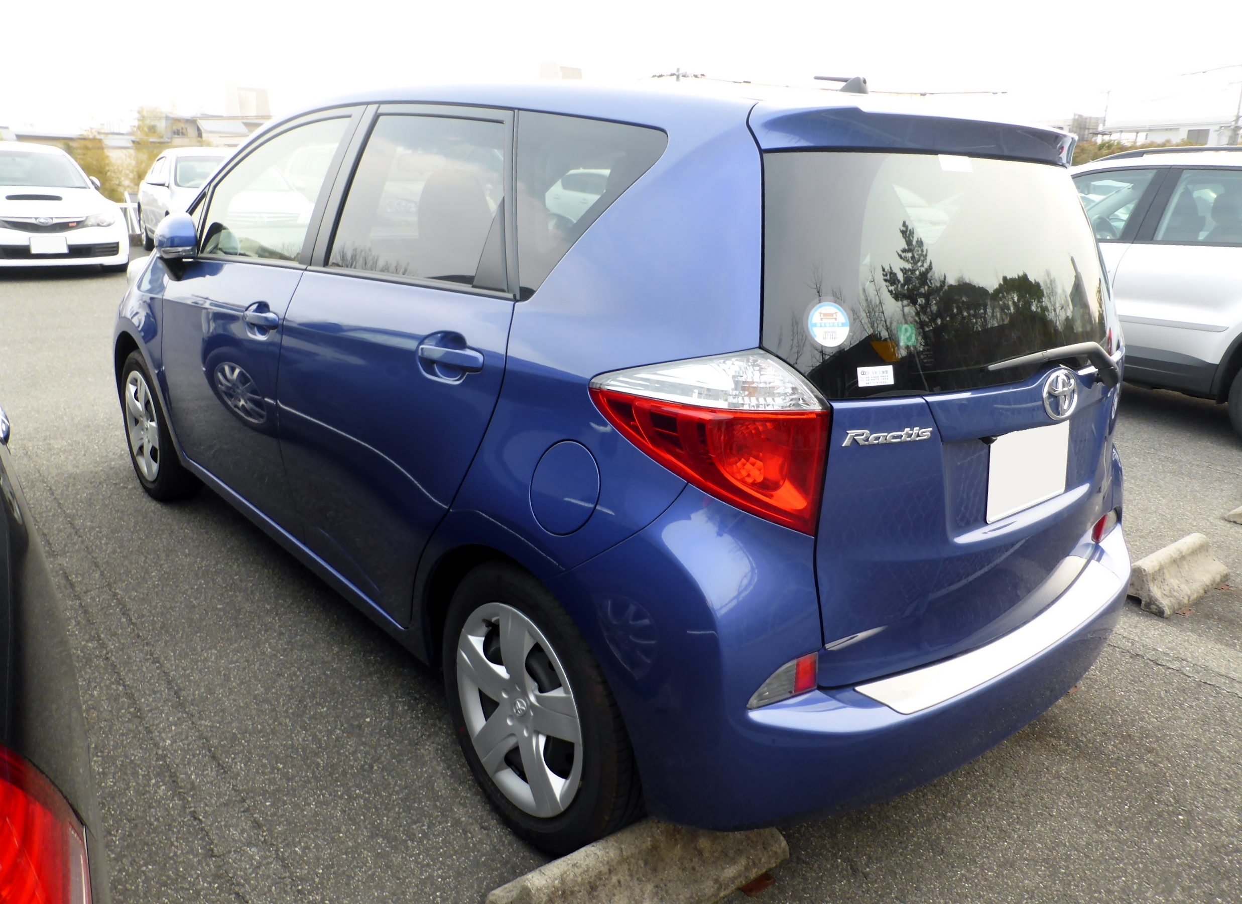 CP120型トヨタ・ラクティス1.5Gをリアから撮影。